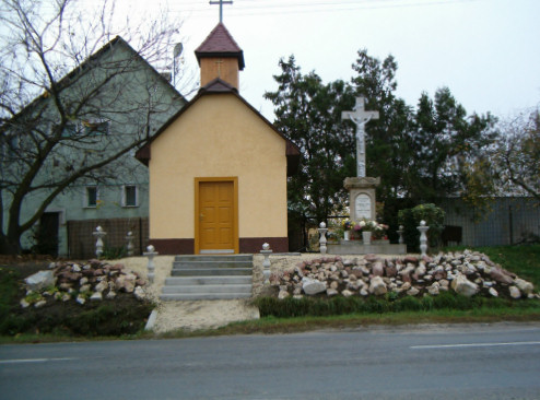 Kis kápolna, Kakucs